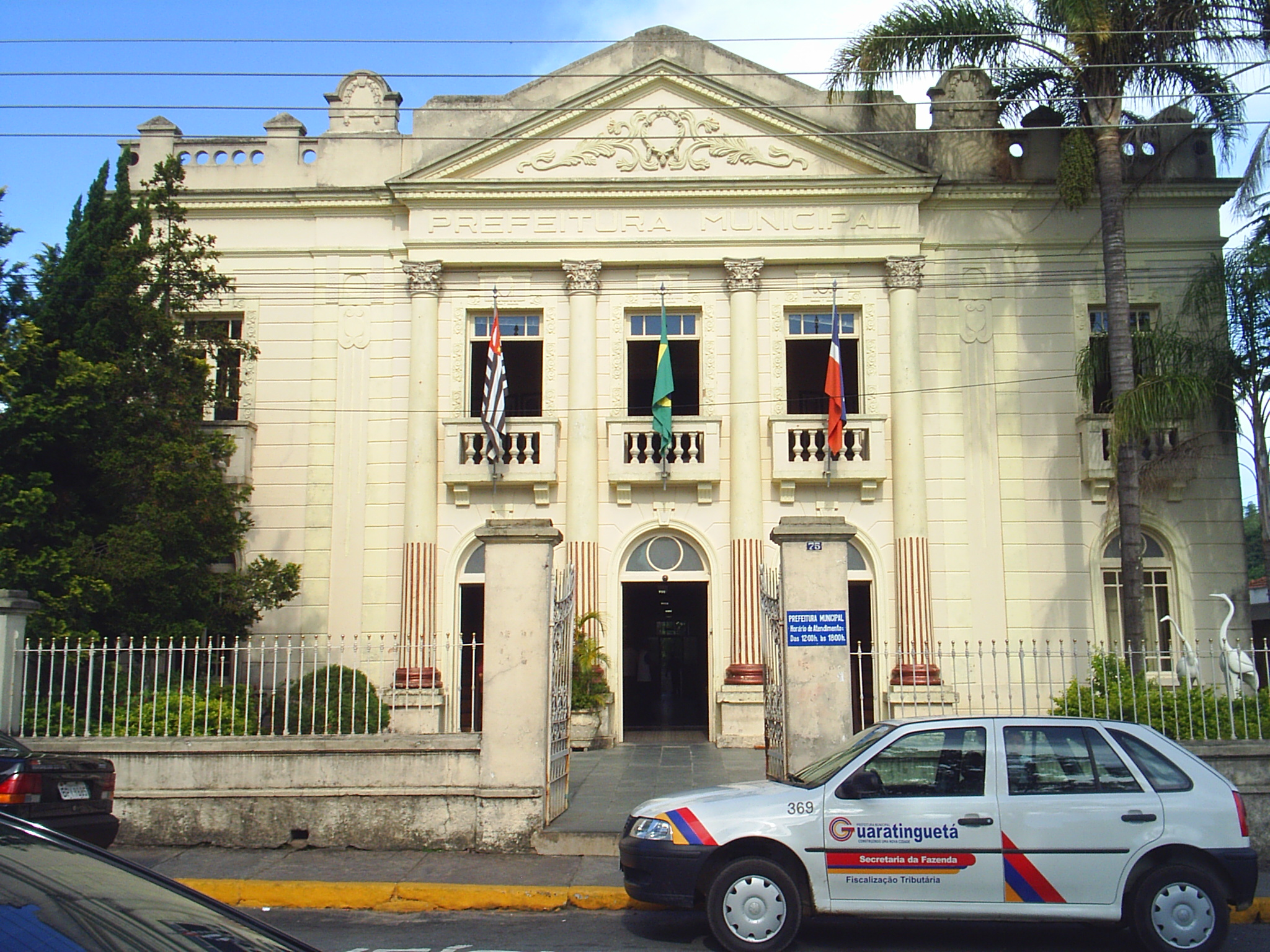 Prefeitura Municipal de Guaratinguetá